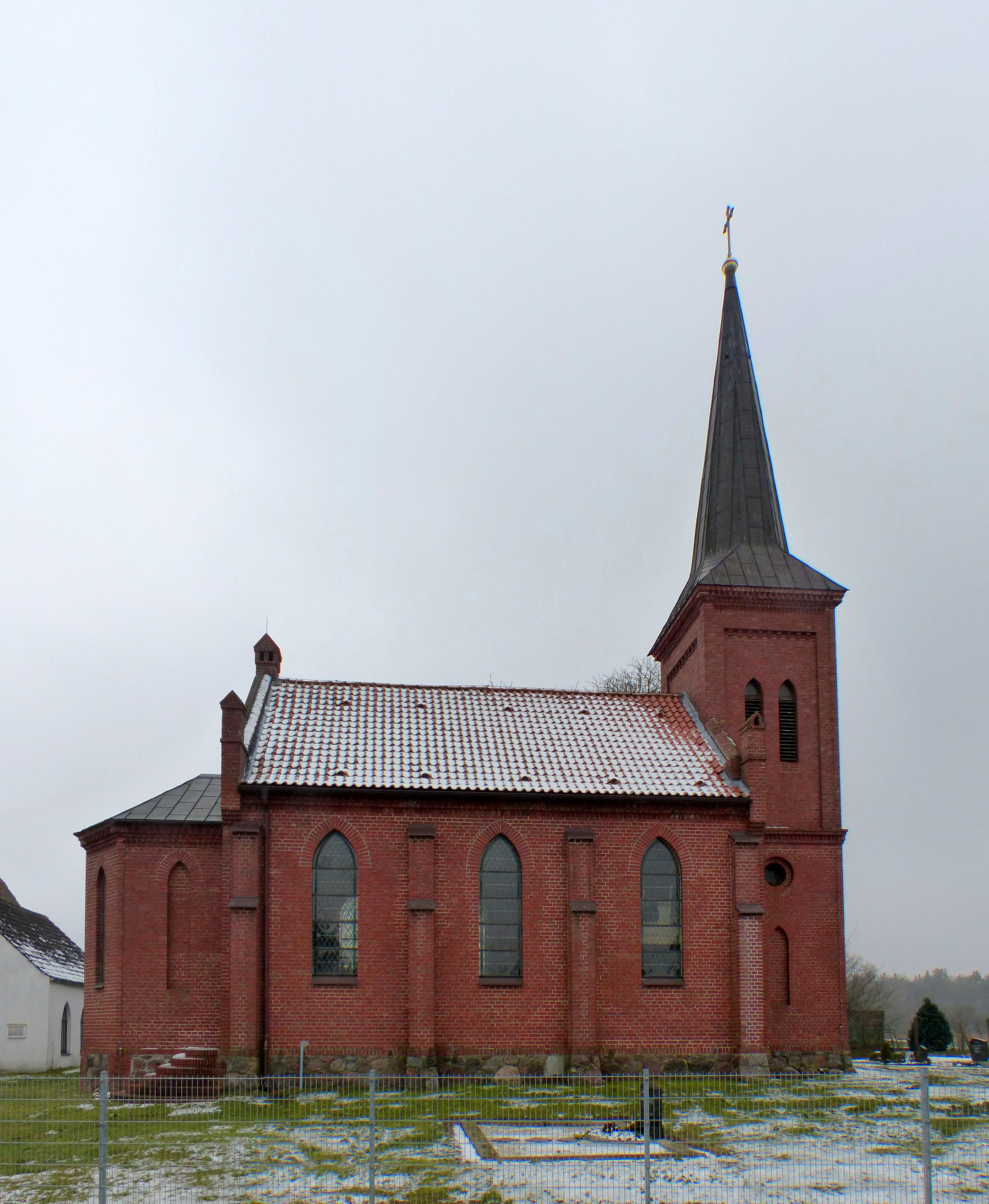 Kirche in Neuendorf A, Ansicht von Norden